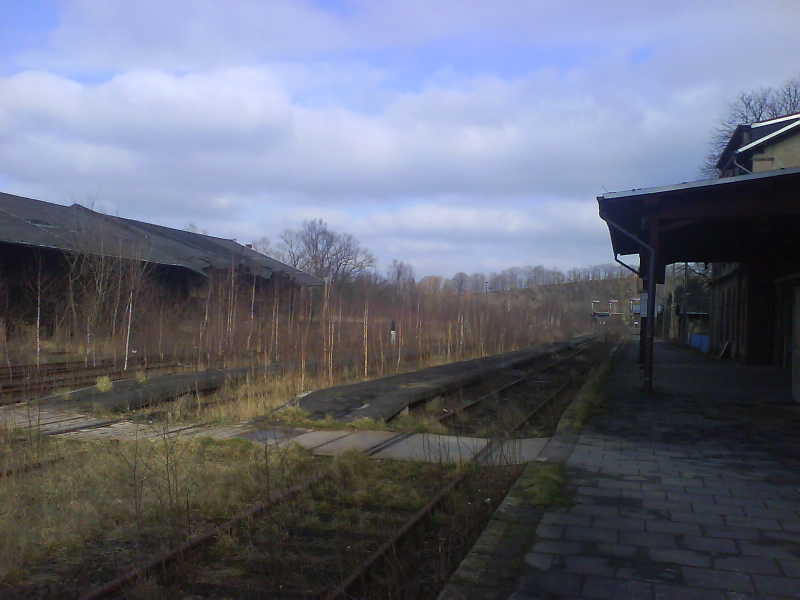 Bahnhof Rochlitz in Sachsen im Februar 2007.